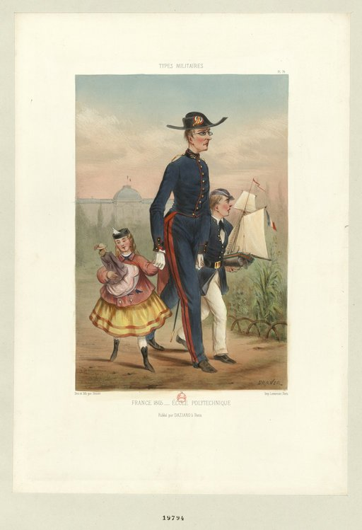 Un polytechnicien se promène aux Tuileries avec sa petite sœur, qui porte une poupée, et son petit frère qui, en uniforme de lycéen, tient sous le bras un bateau avec lequel il va jouer sur l'un des bassins 1 est. : lithographie en camaïeu ; 29,3 x 19,9 cm Recueil. Collection de Vinck. Un siècle d'histoire de France par l'estampe, 1770-1870. Vol. 165 (pièces 19772-19857), Second Empire